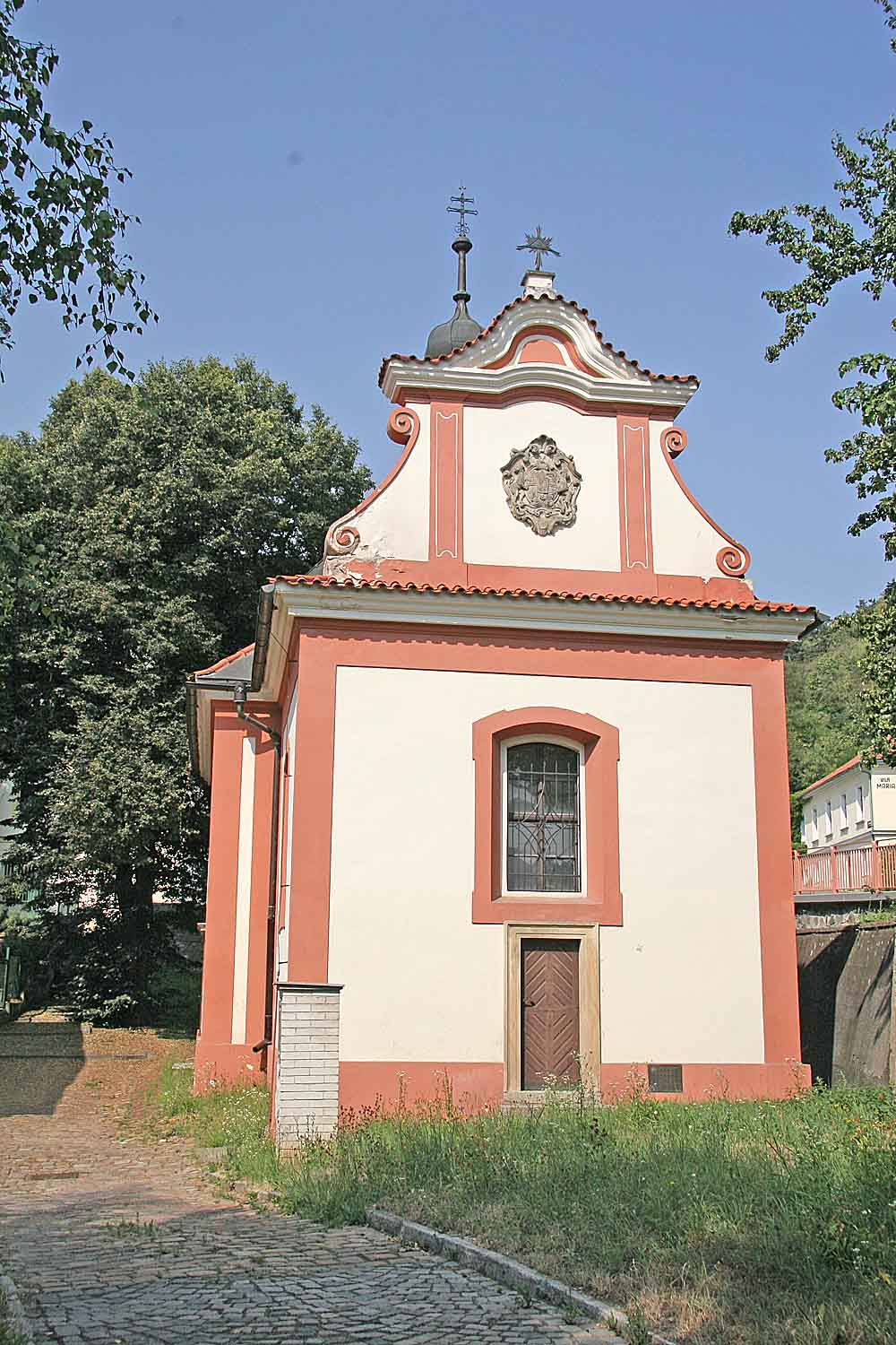 Průčelí barokního kostela Narození Panny Marie z roku 1774 v Malé Chuchli